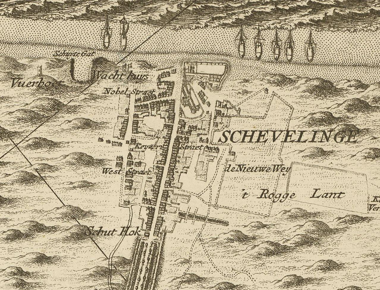 Kaart van het hoogheemraadschap van Delfland, gemeten door de landmeters Nicolaas en Joacobus Kruchius. Afgebeeld is Scheveningen, Zuid-Holland.